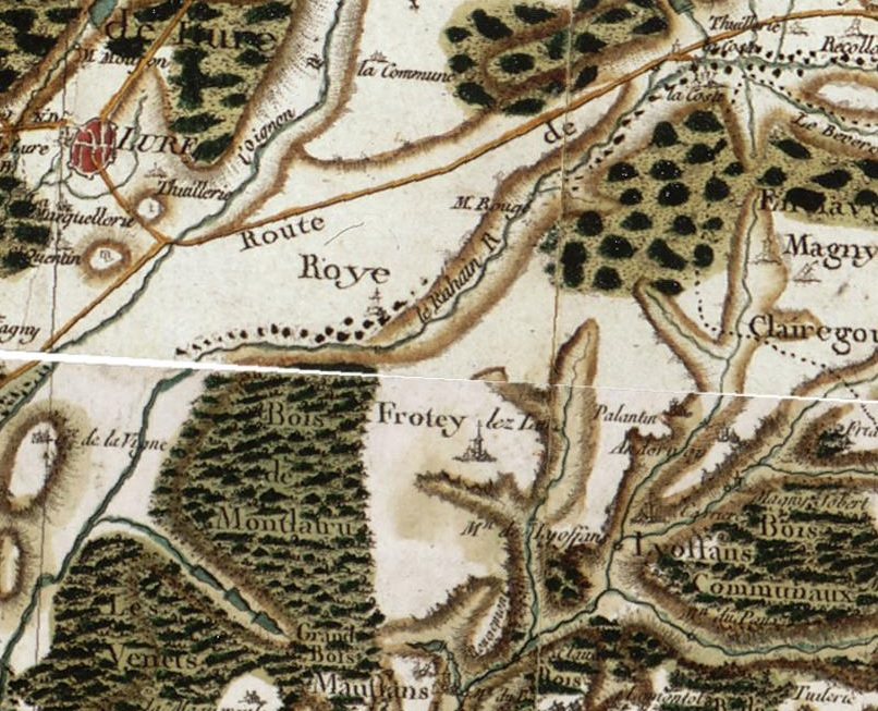 Frotey, Roye et Lure sur la carte de Cassini.